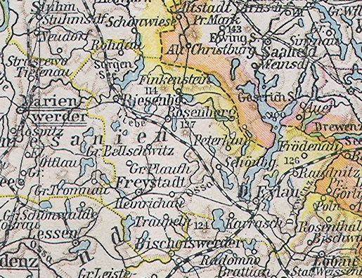 Kreis Rosenberg in Westpreußen, Ausschnitt aus File:Ost-_und_Westpreussen.jpg